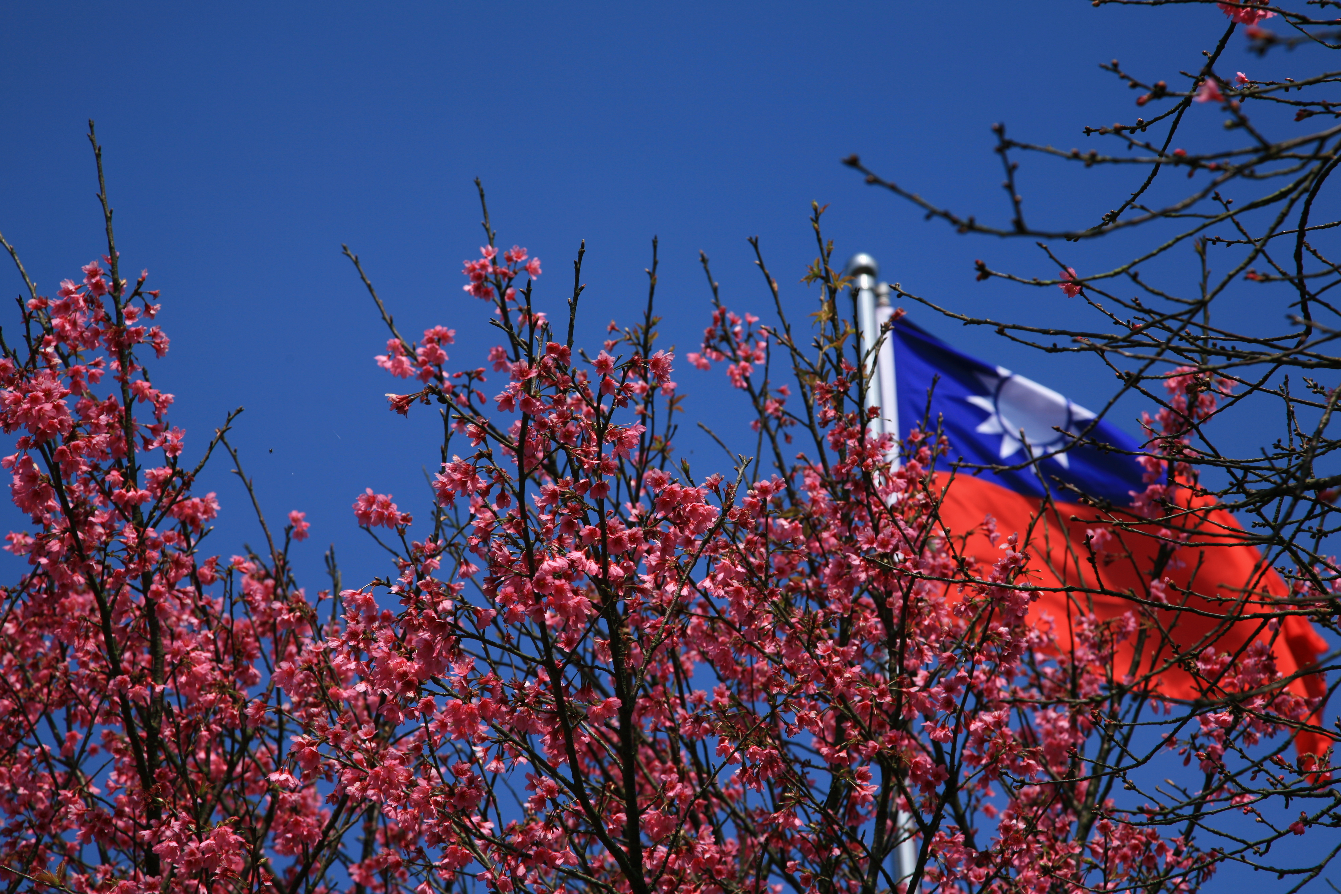 中文（台灣）: 新北市汐止區大尖山，山櫻花與中華民國國旗。